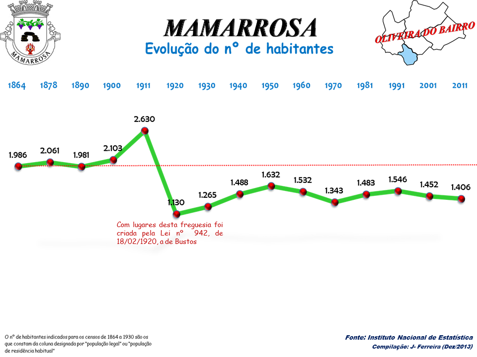 Evolução da População 1864 / 2011